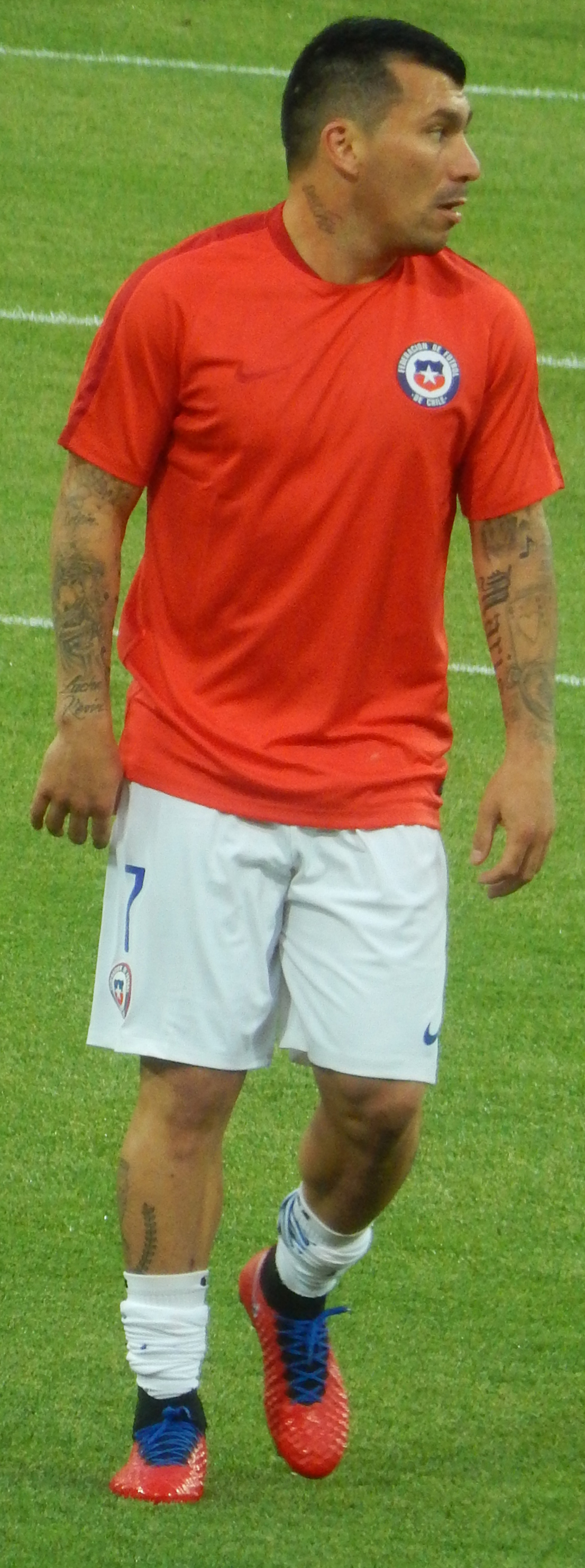 Гари Медель во время матча против сборной Камеруна